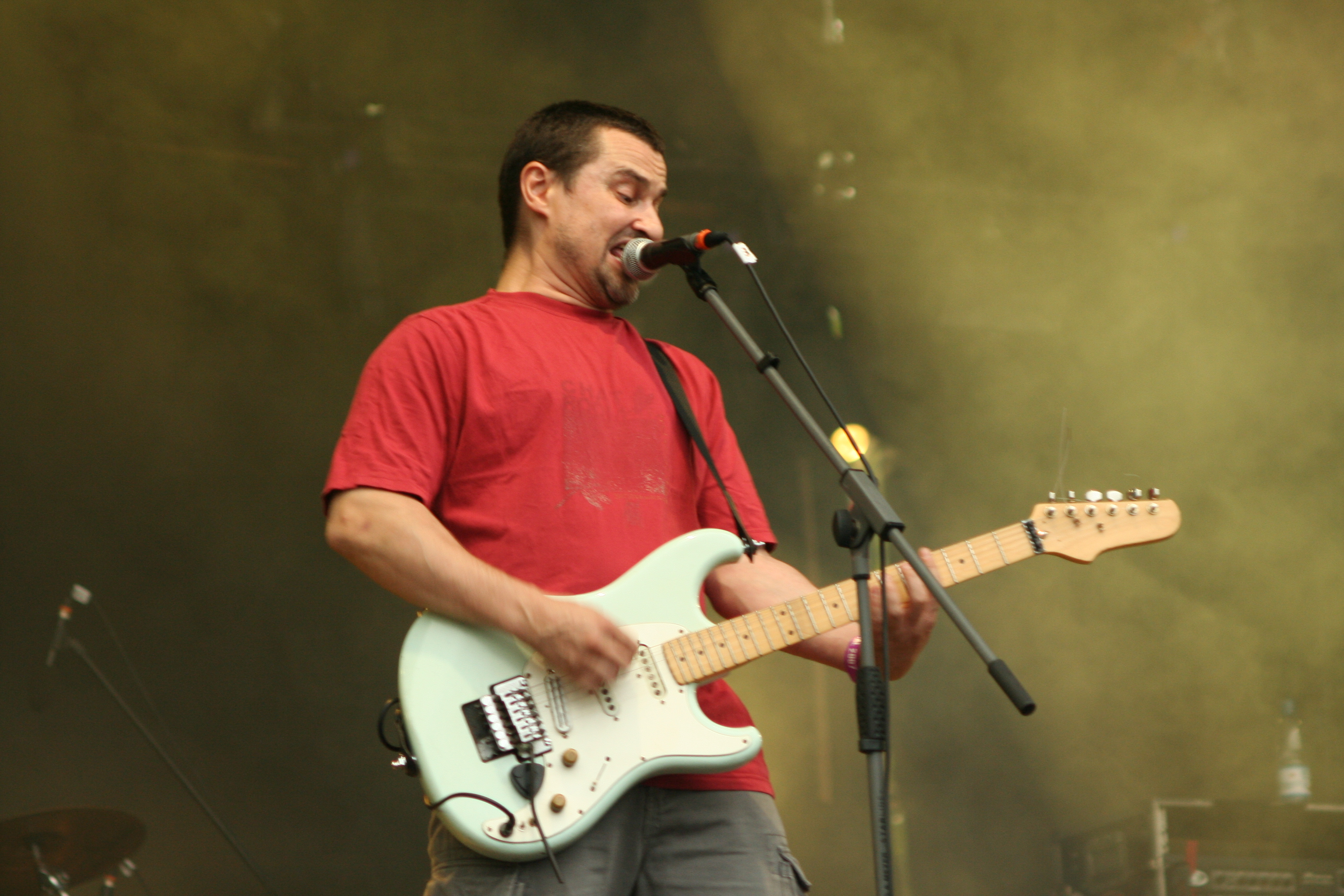 Dezerter, Off Festival, Mysłowice